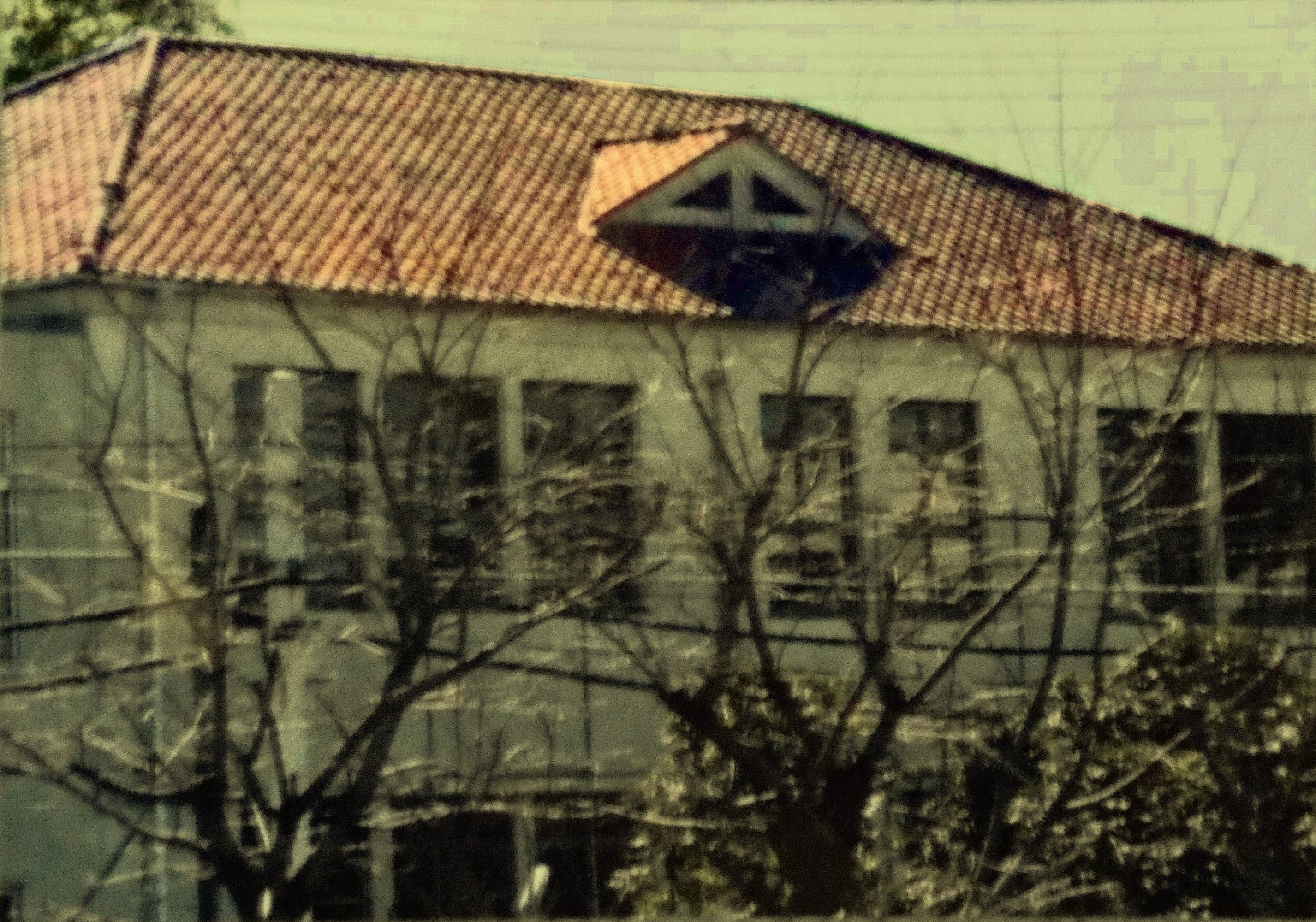 旧興風圖書館